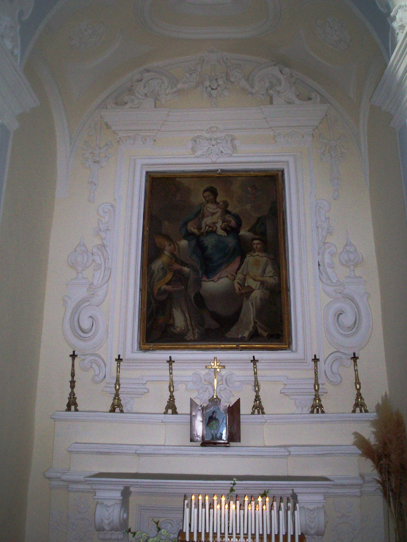 Cappella della Madonna col Bambino nella Chiesa di Santa Maria in Cerreto Sannita (Bn)